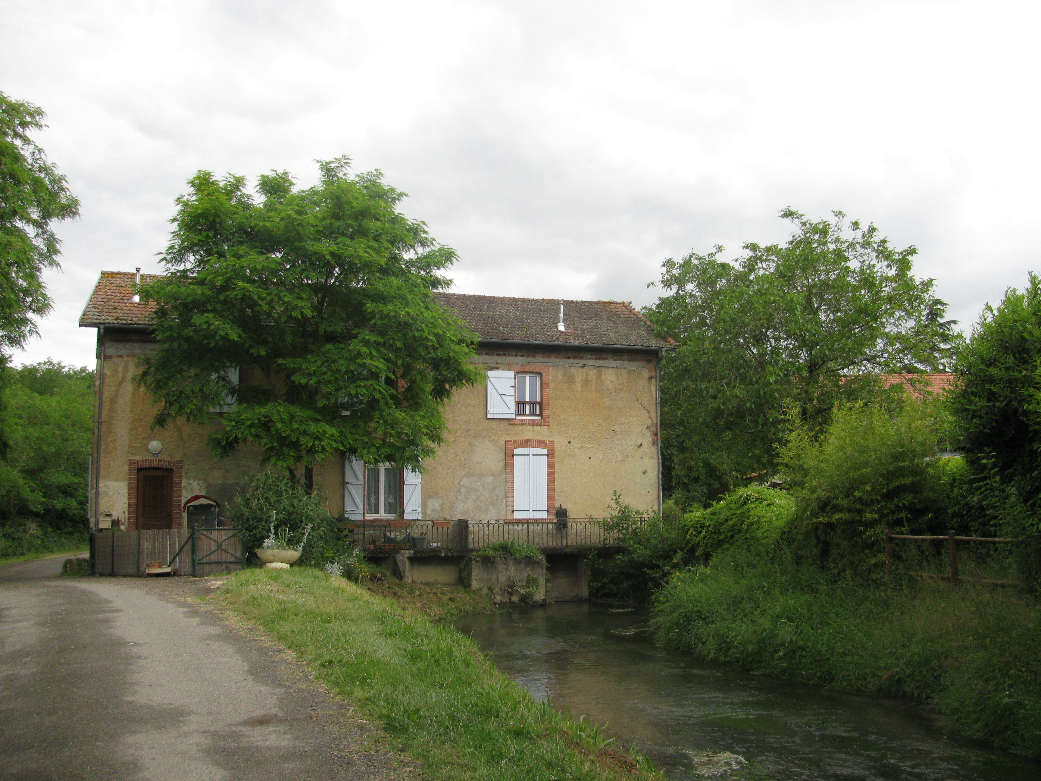 moulin de Cardayre à Préchac sur Adour